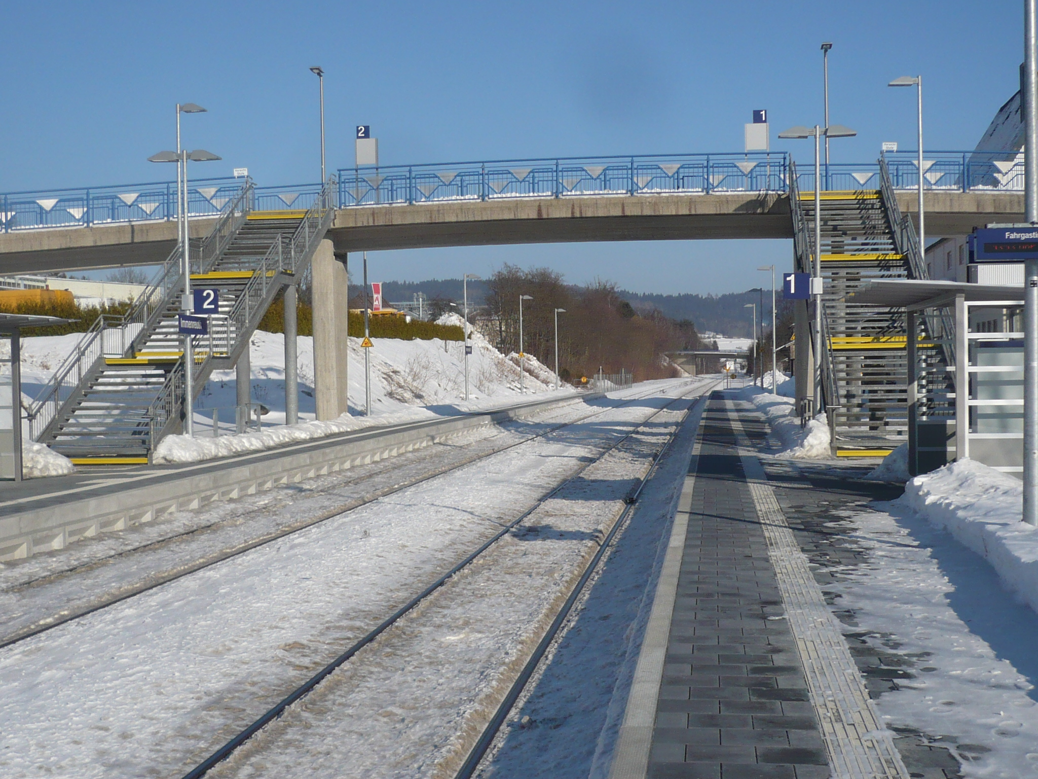 Bahnhof Immenreuth nach dem Umbau